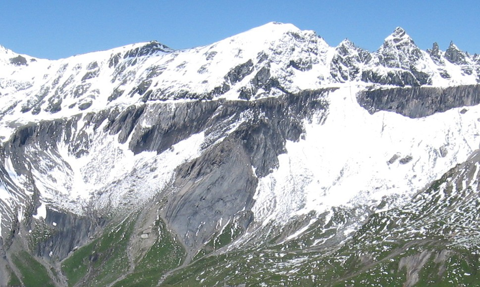 Ofen von Osten. Nach links (Richtung Süden) folgt Punkt 2818 und Grischsattel 2760 m. Rechts Tschingelhörner.